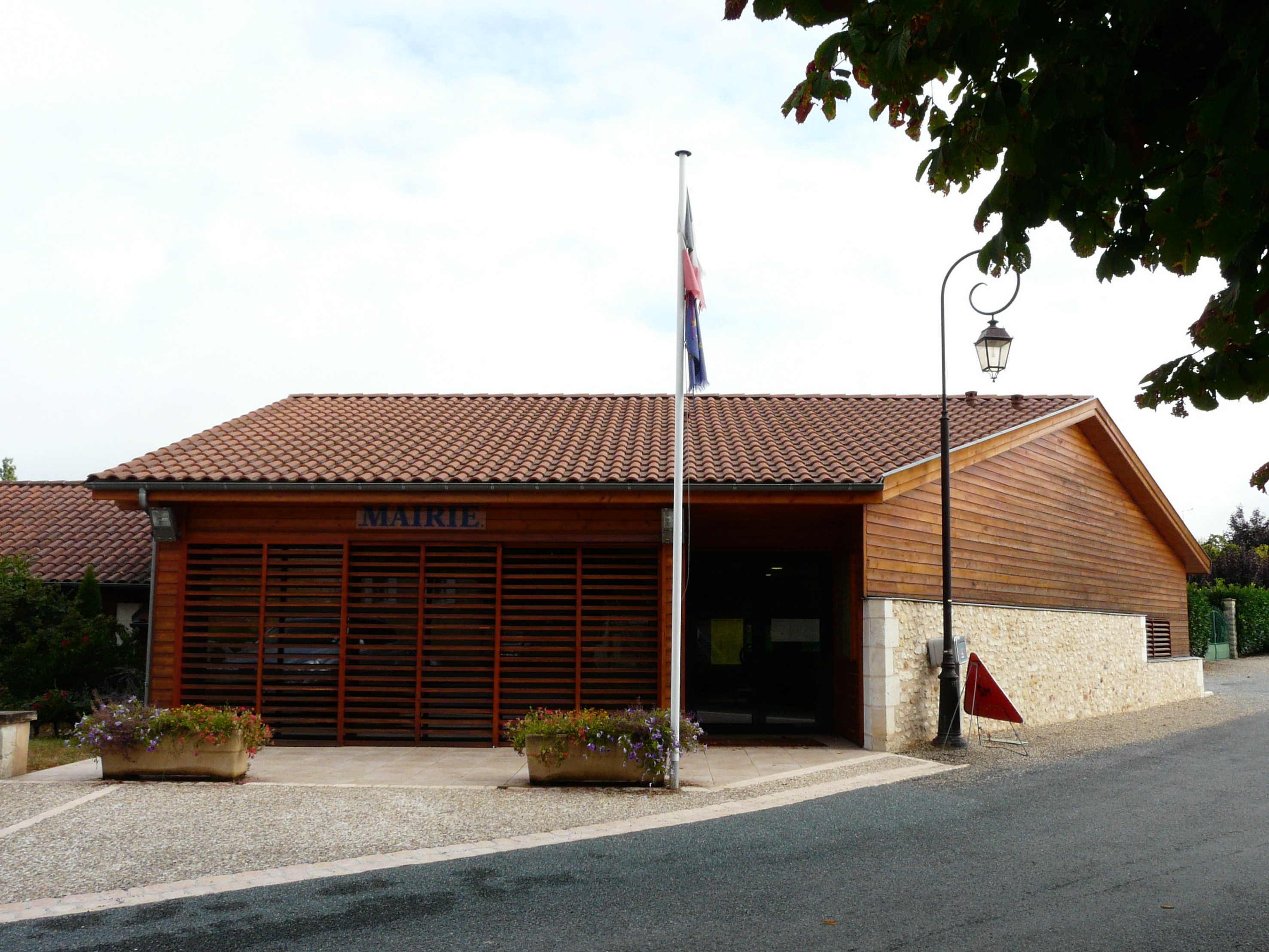 La mairie de Chalagnac, Dordogne, FRance.